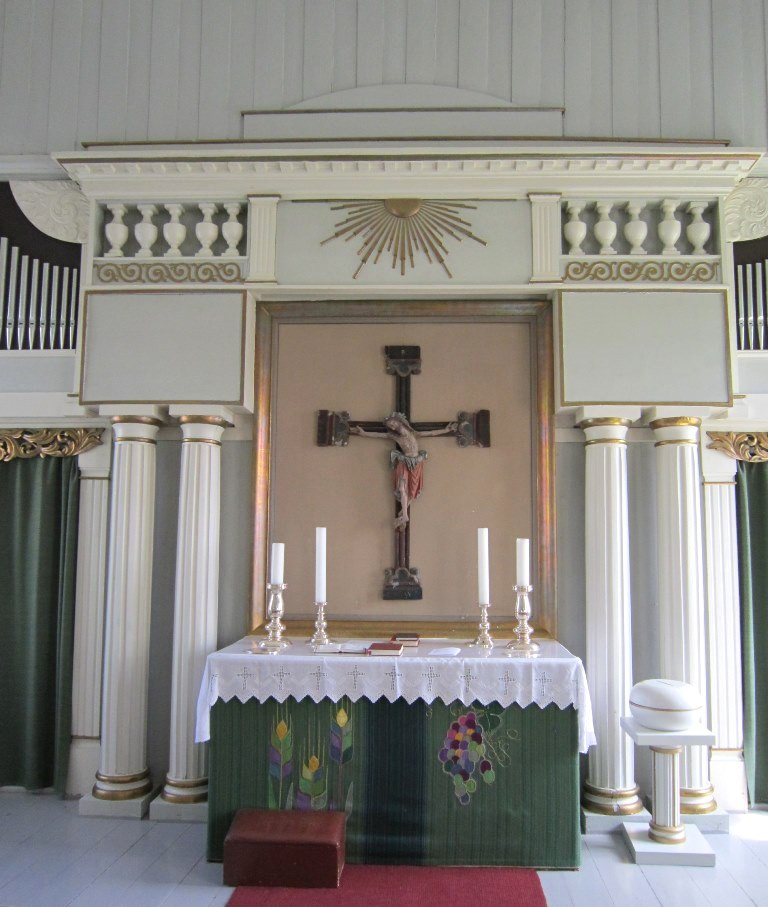 Alterparti i Vinger kirke, Kongsvinger